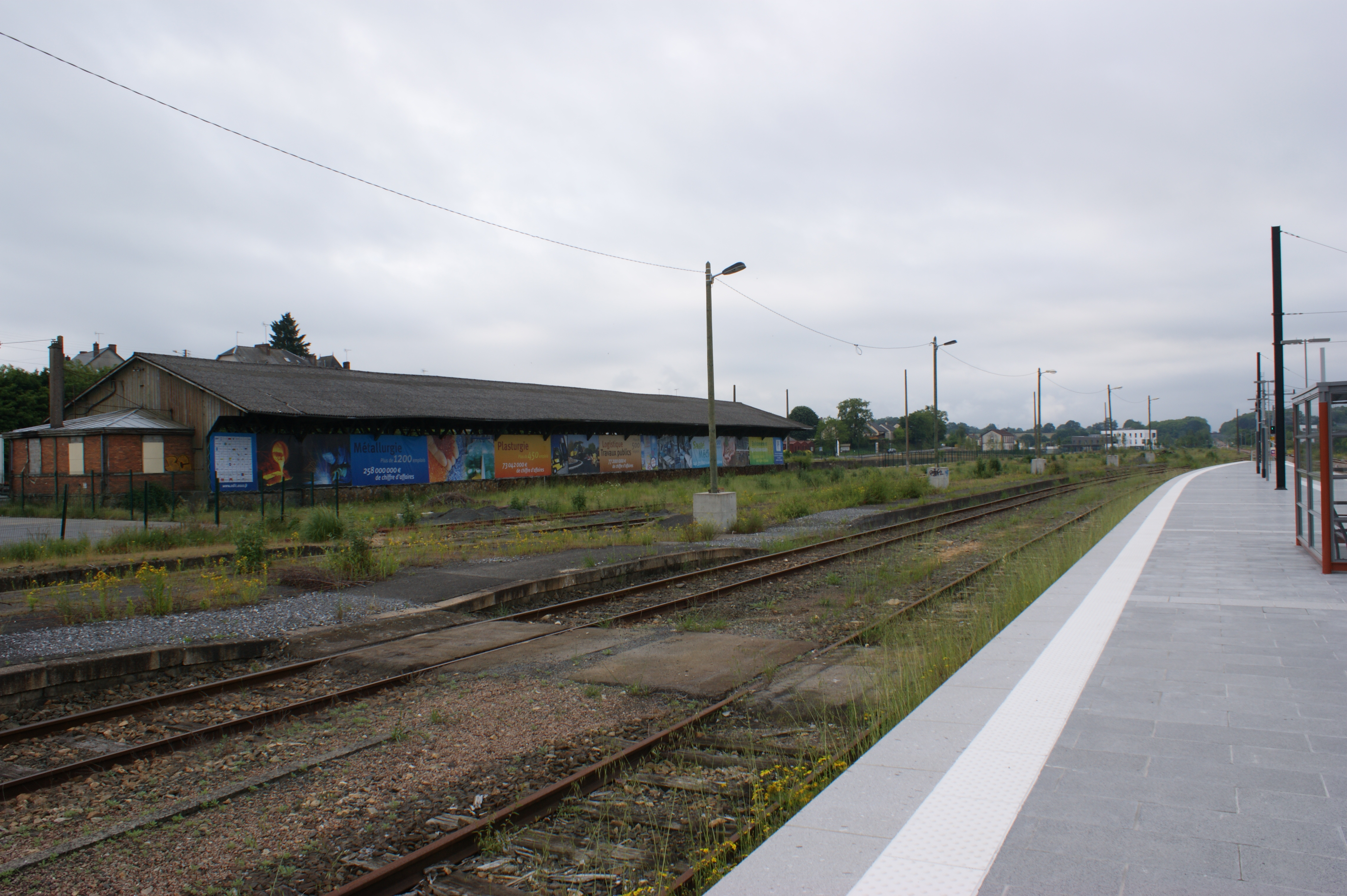 Gare de Châteaubriant, nouveau quai et ancienne halle à marchandises décorées pour l'arrivée du tram-train.